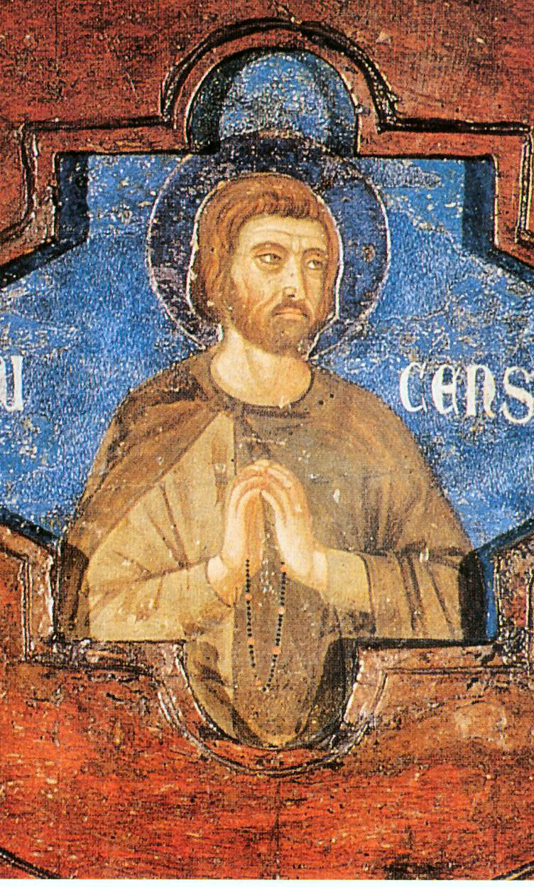 San Lucchese